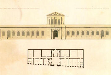 Projeto da Academia Imperial de Belas Artes de Grandjean de Montigny e publicado em Viagem pitoresca e histórica ao Brasil, de Jean Baptiste Debret, Tomo III